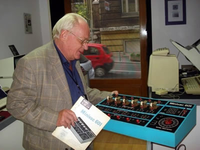 Branimir Makanec u riječkom muzeju računala Peek & Poke.